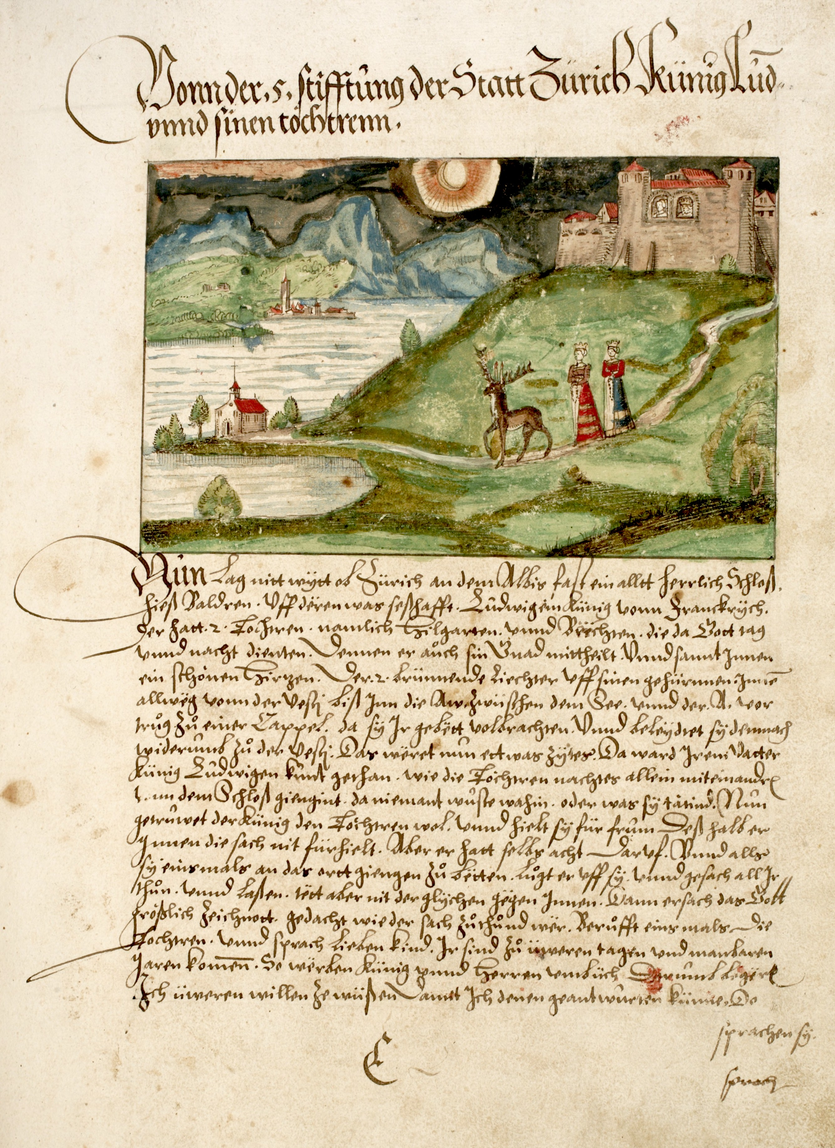 Gründungslegende des Fraumünsters Die beiden Töchter von König Ludwig der Deutsche, Hildegard und Bertha, werden von einem Hirsch vom Schloss Baldern zu einer Kapelle am Zürichsee geleitet, wo später das Fraumünster gebaut wurde. Links Zürich.